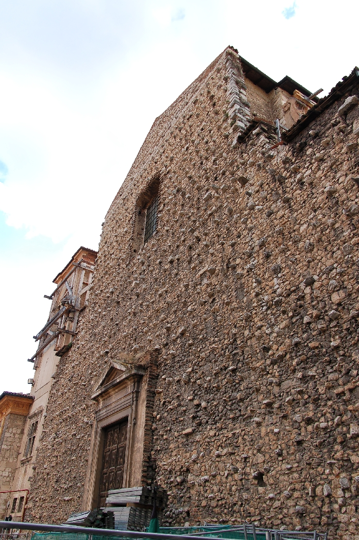 L'Aquila 2011